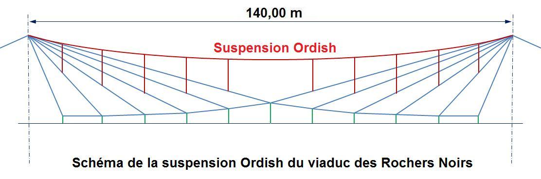 Schéma de la Suspension Ordish du viaduc des Rochers Noirs